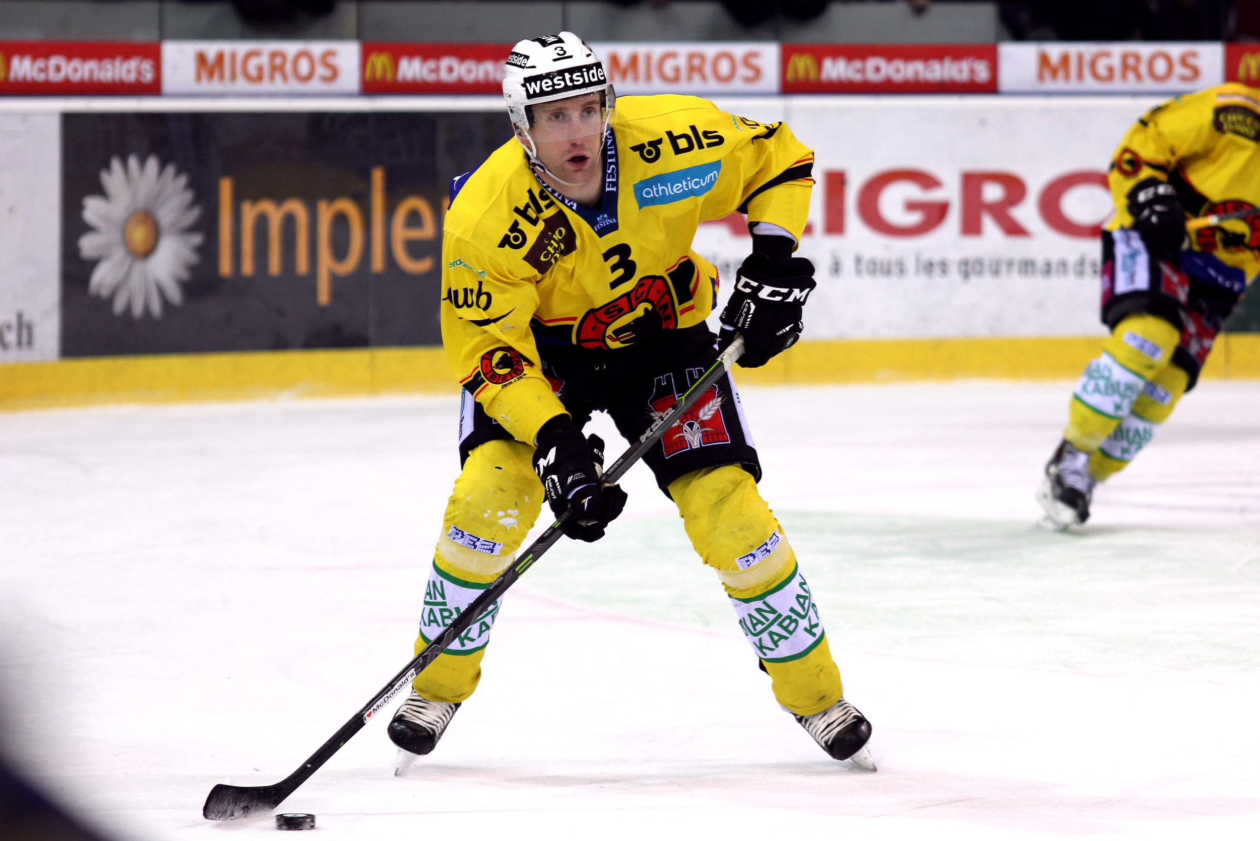 Justin Krueger (B 3).